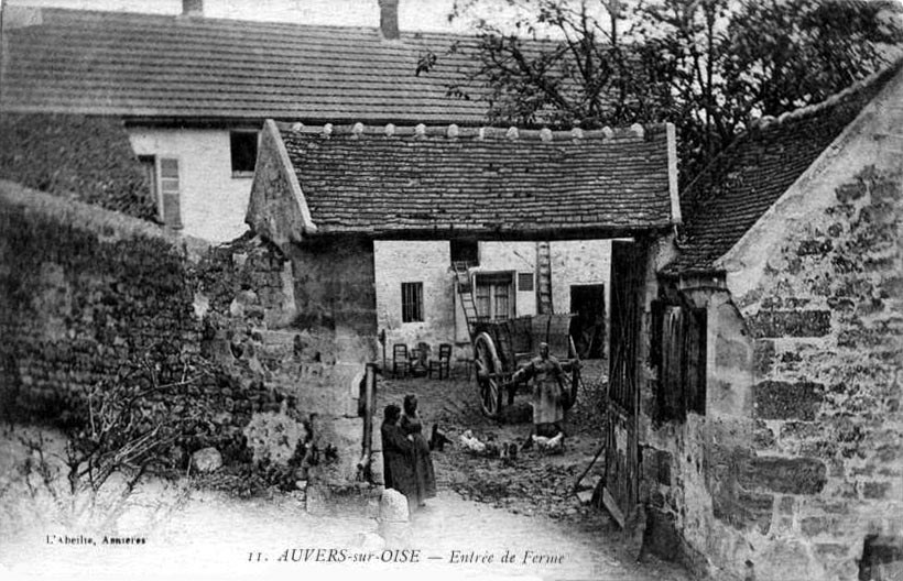 Auvers-sur-Oise - Entrée de Ferme vers 1900Auvers-sur-Oise, Val-d'Oise4 rue Marceau.